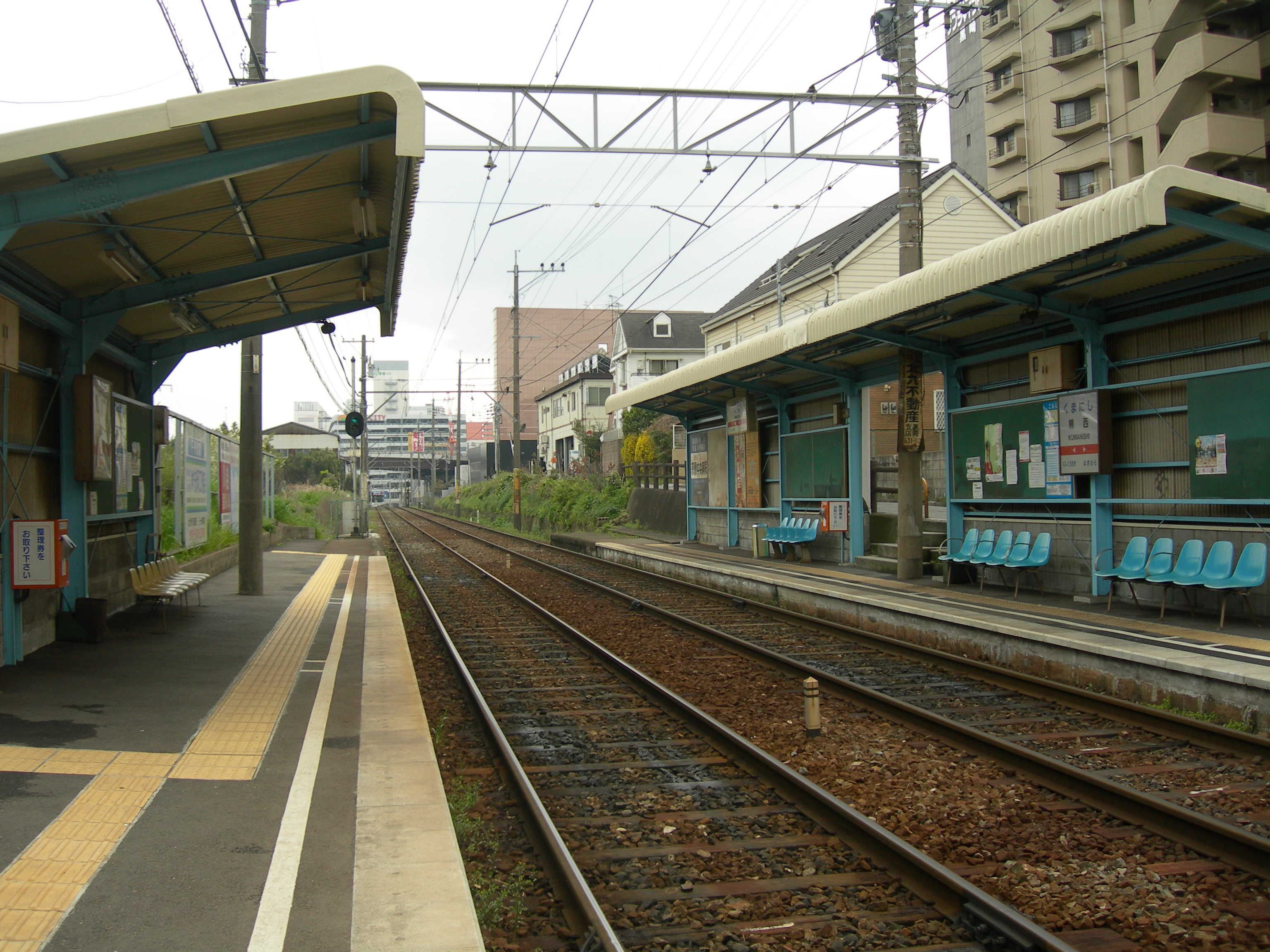 熊西駅